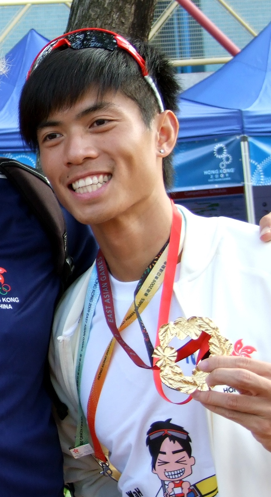 中文（香港）: 蘇秀華奪得2009年東亞運動會輕量級雙人雙槳艇金牌